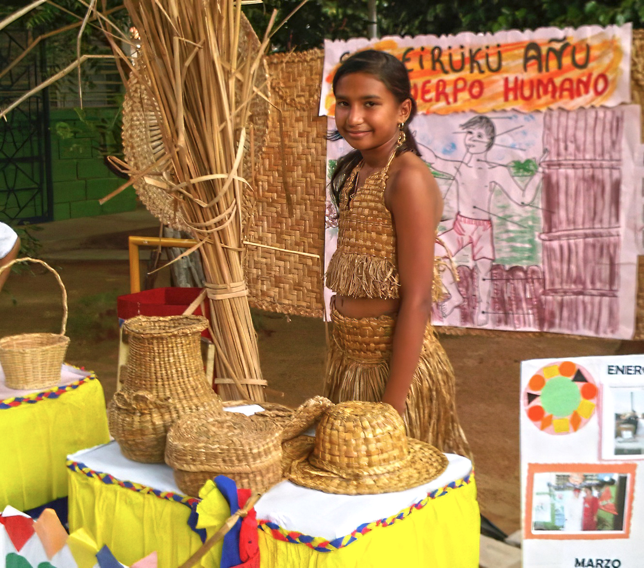 Niña de la étnia indígena AÑU mostrando vestimenta y artesanía típica, del Estado Zulia, Venezuela.